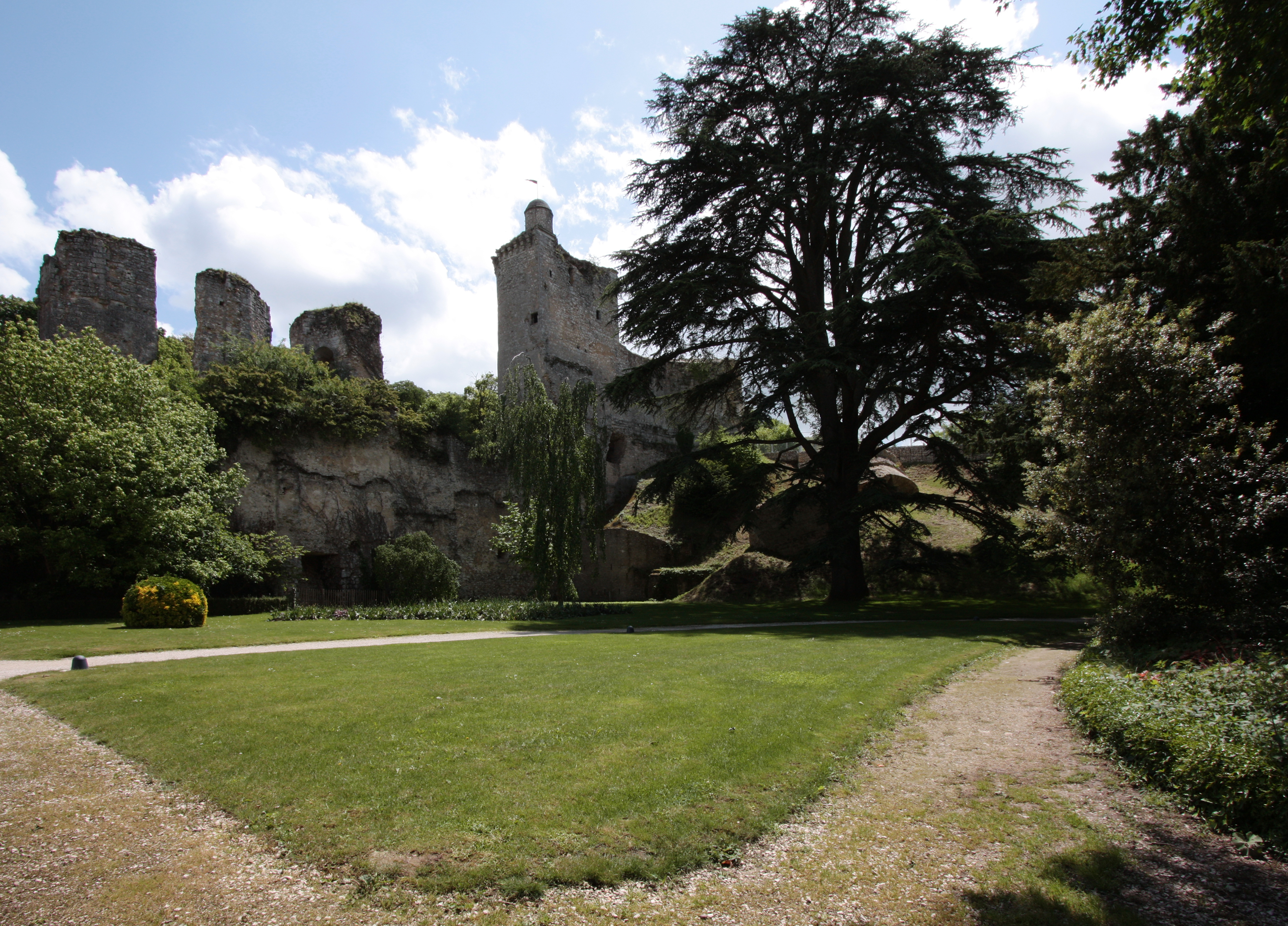 Burg Vendôme in der Kleinstadt Vendôme im Département Loir-et-Cher/Frankreich - Parkanlage auf dem Gelände der Burg.